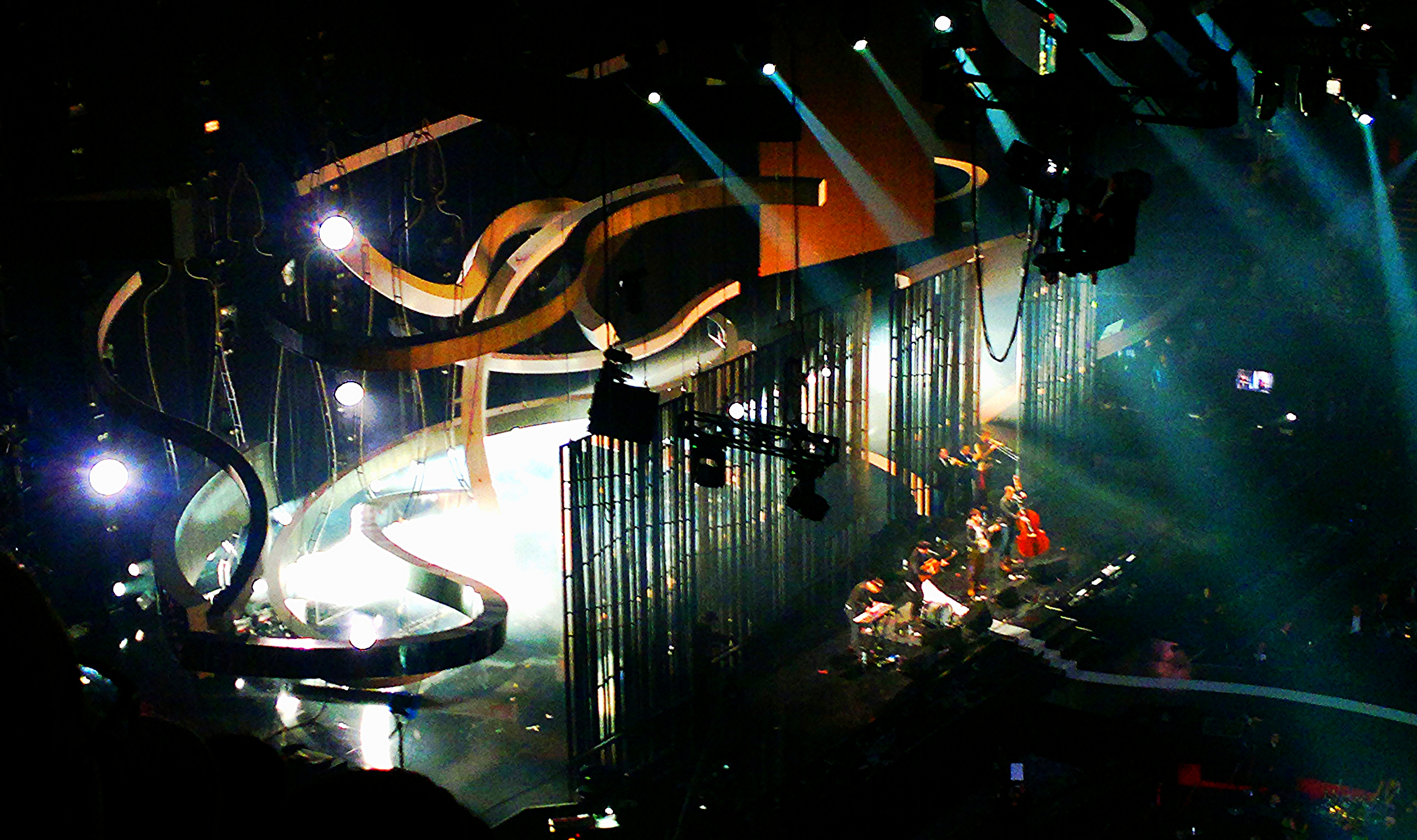 El grupo británico Mumford & Sons presentándose en los premios Brit Awards 2013.